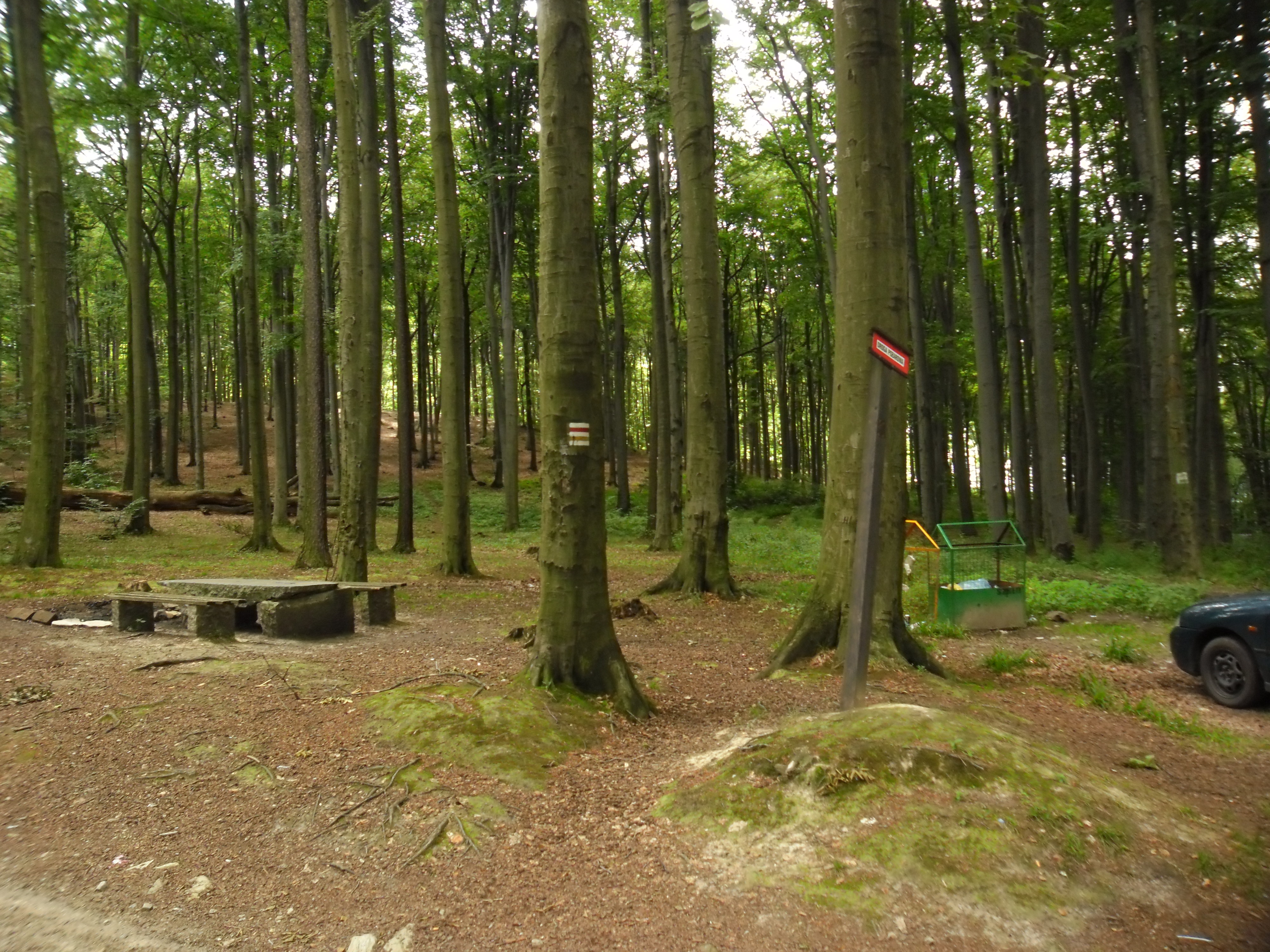 Las tuż przed szczytem Gromnika